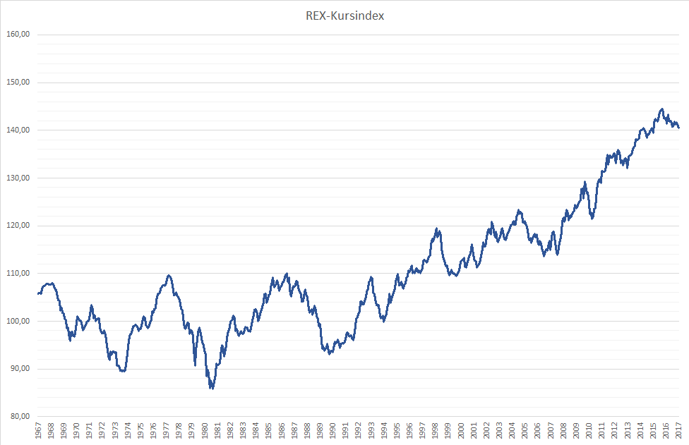 REX-Kursindex Stand: 2017-12-31, 51 Jahre monatliche Daten, lineare Skala, Kursdaten von: Deutsche Bundesbank